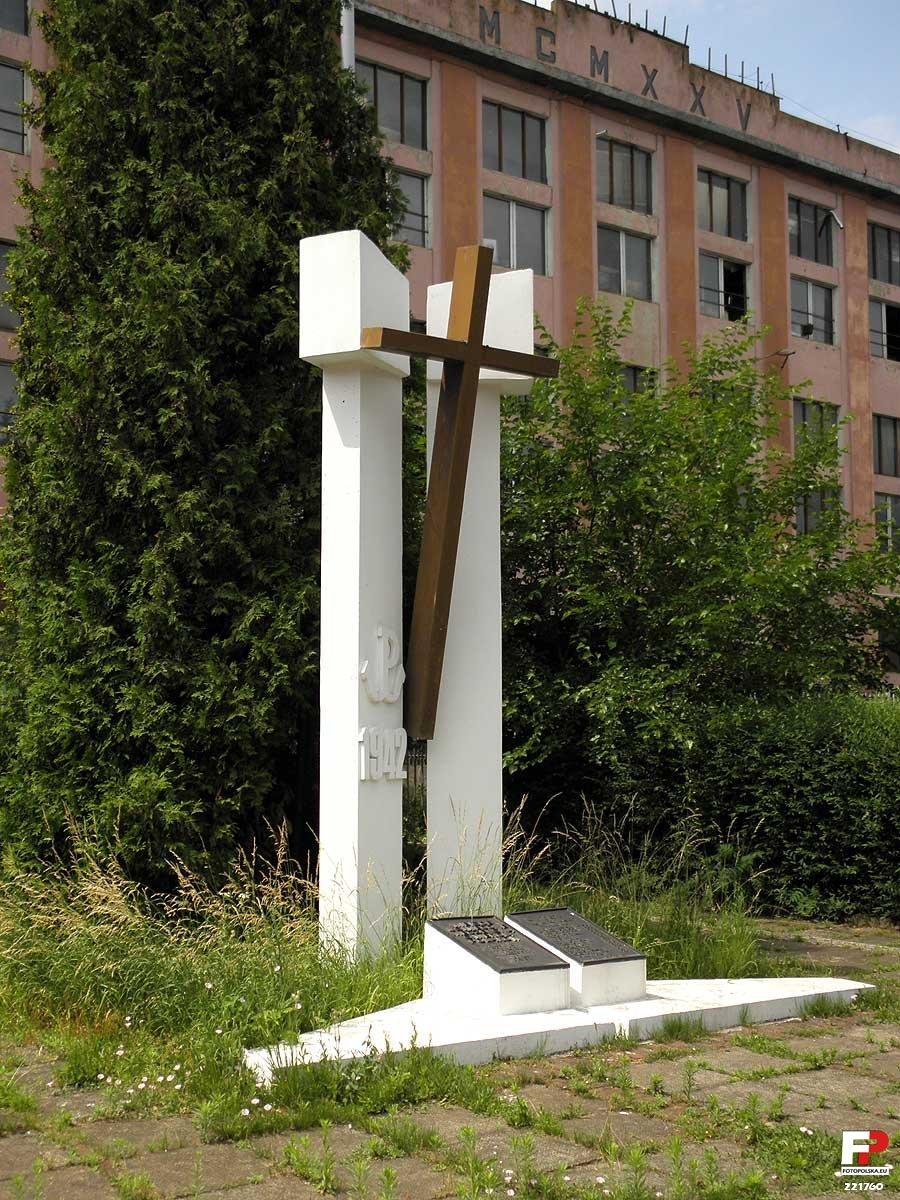 Miejsce stracenia pracowników radomskich zakładów.